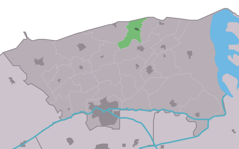 Kaartsje fan himrik fan Nes